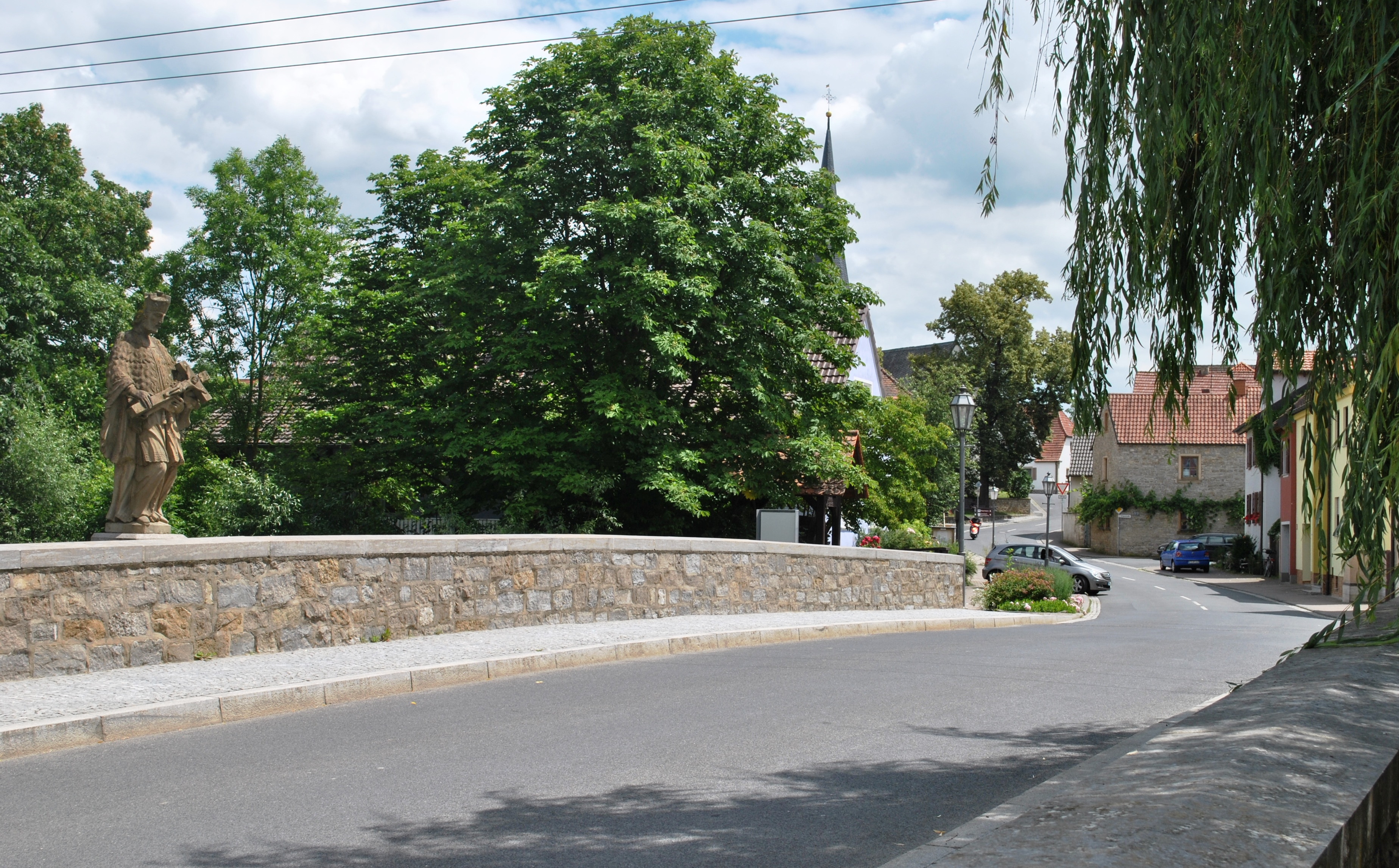 Brücke, Obervolkach, Nepomuk-Statue, Bürgermeister-Erhard-Straße